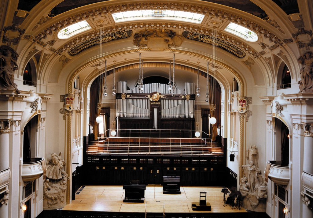 Ansicht der Konzertsaal-Orgel von Voit im Smetanasaal Prag.